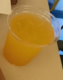 Papelon con limon (Milano 2019)